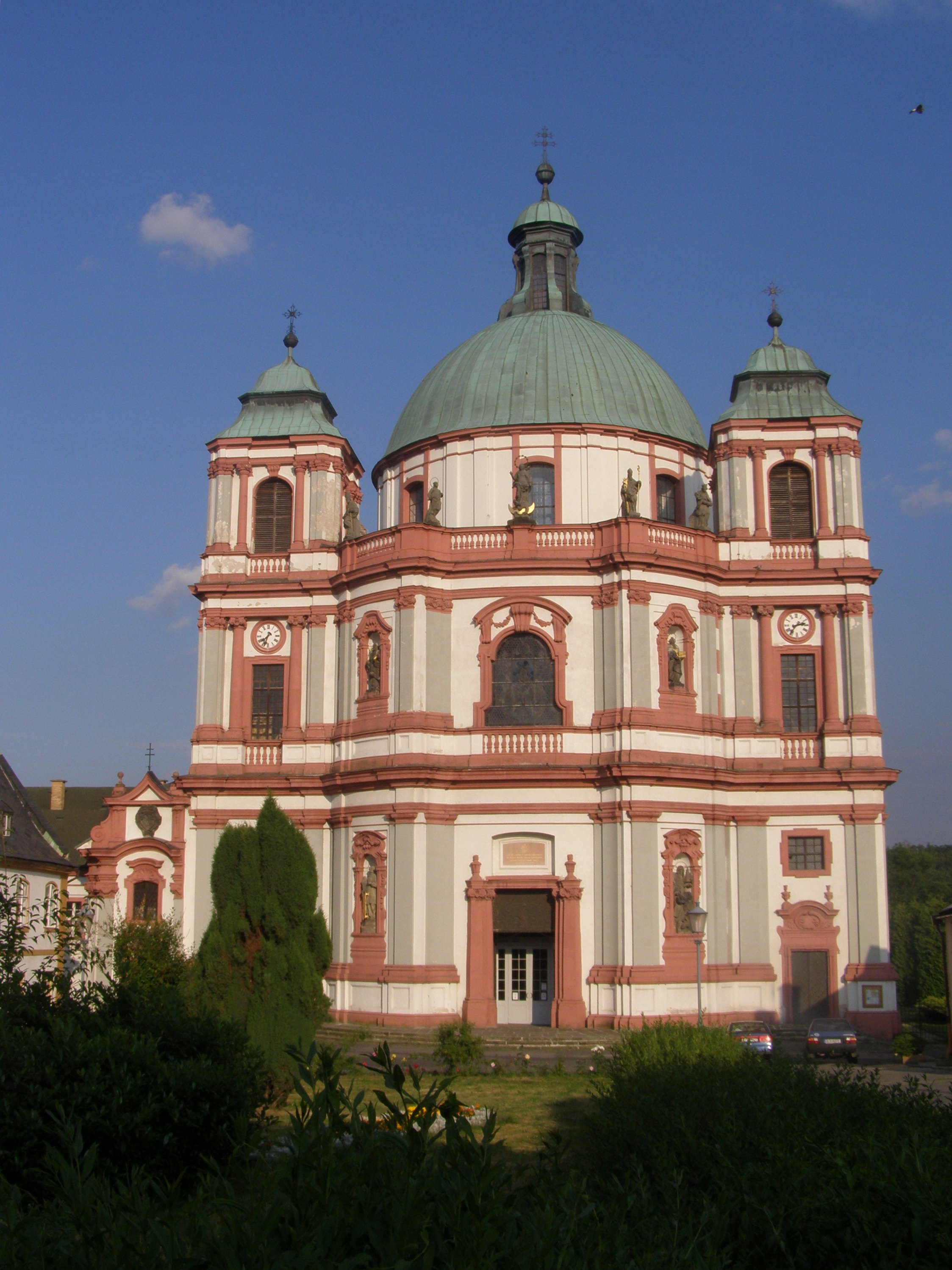 Česky: Jablonné v Podještědí, průčelí baziliky svatého Vavřince a svaté Zdislavy